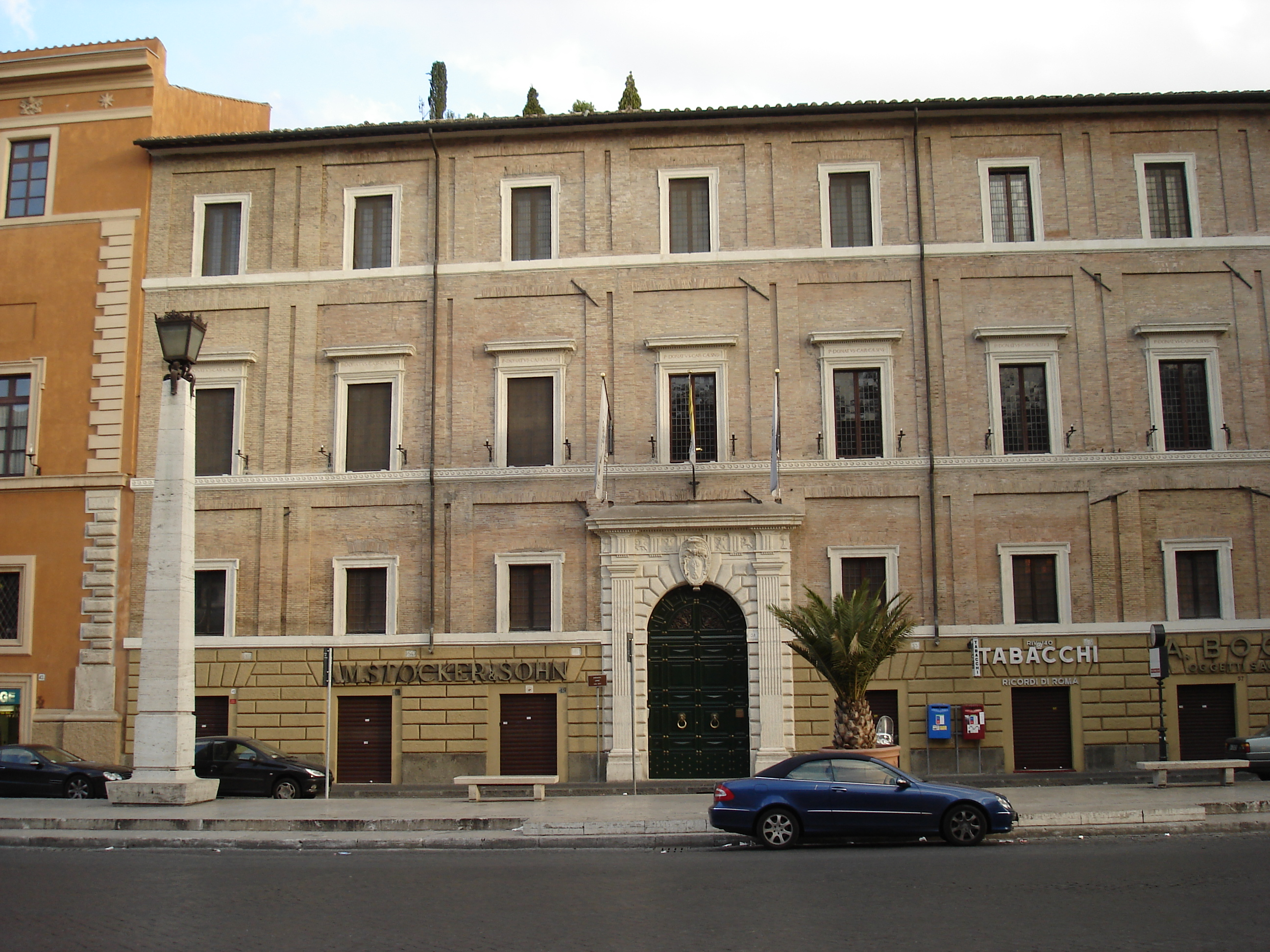 Palazzo Cesi Armellini in Rome in July